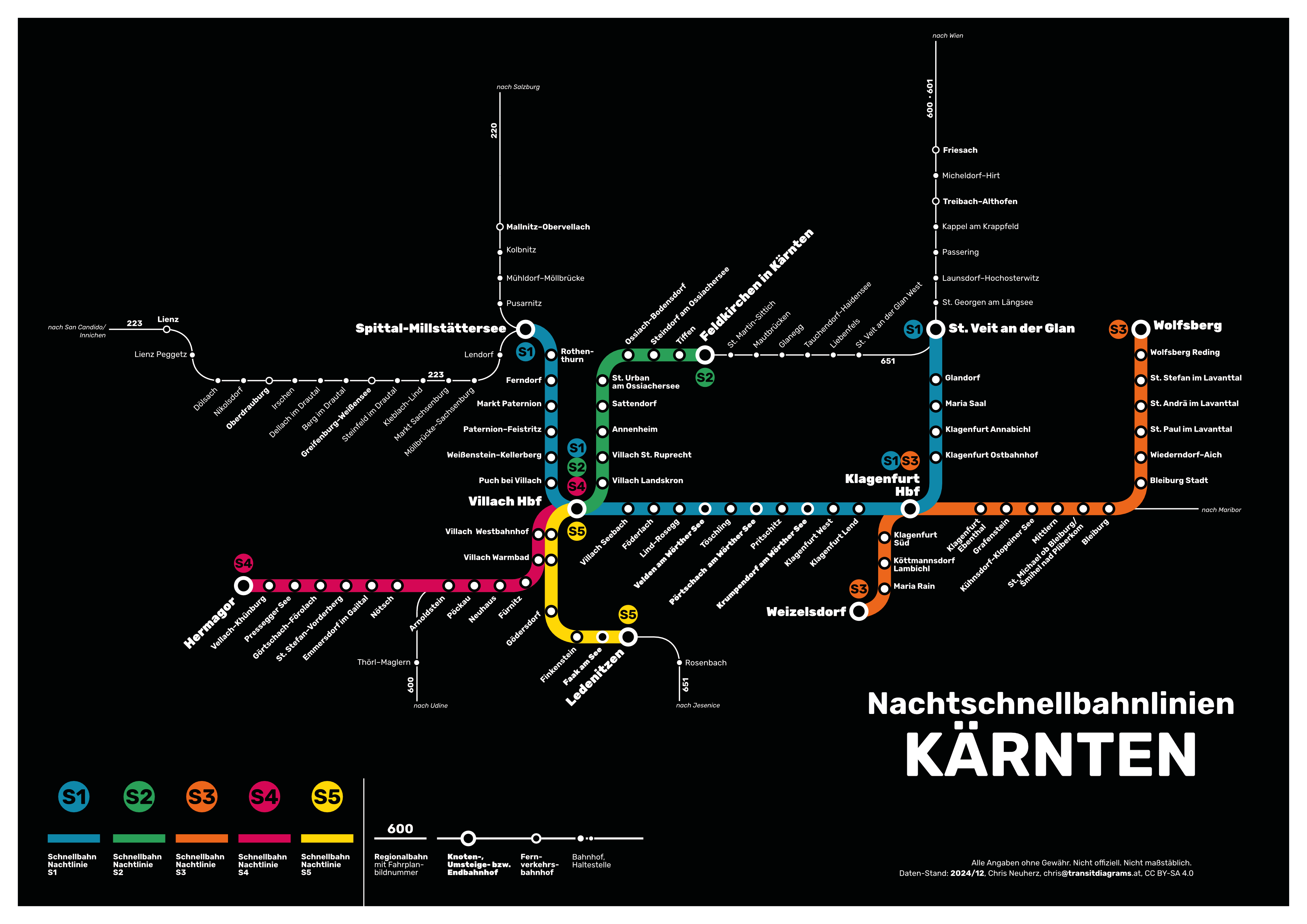 S-Bahn-Netz in den Sommernächten 2019